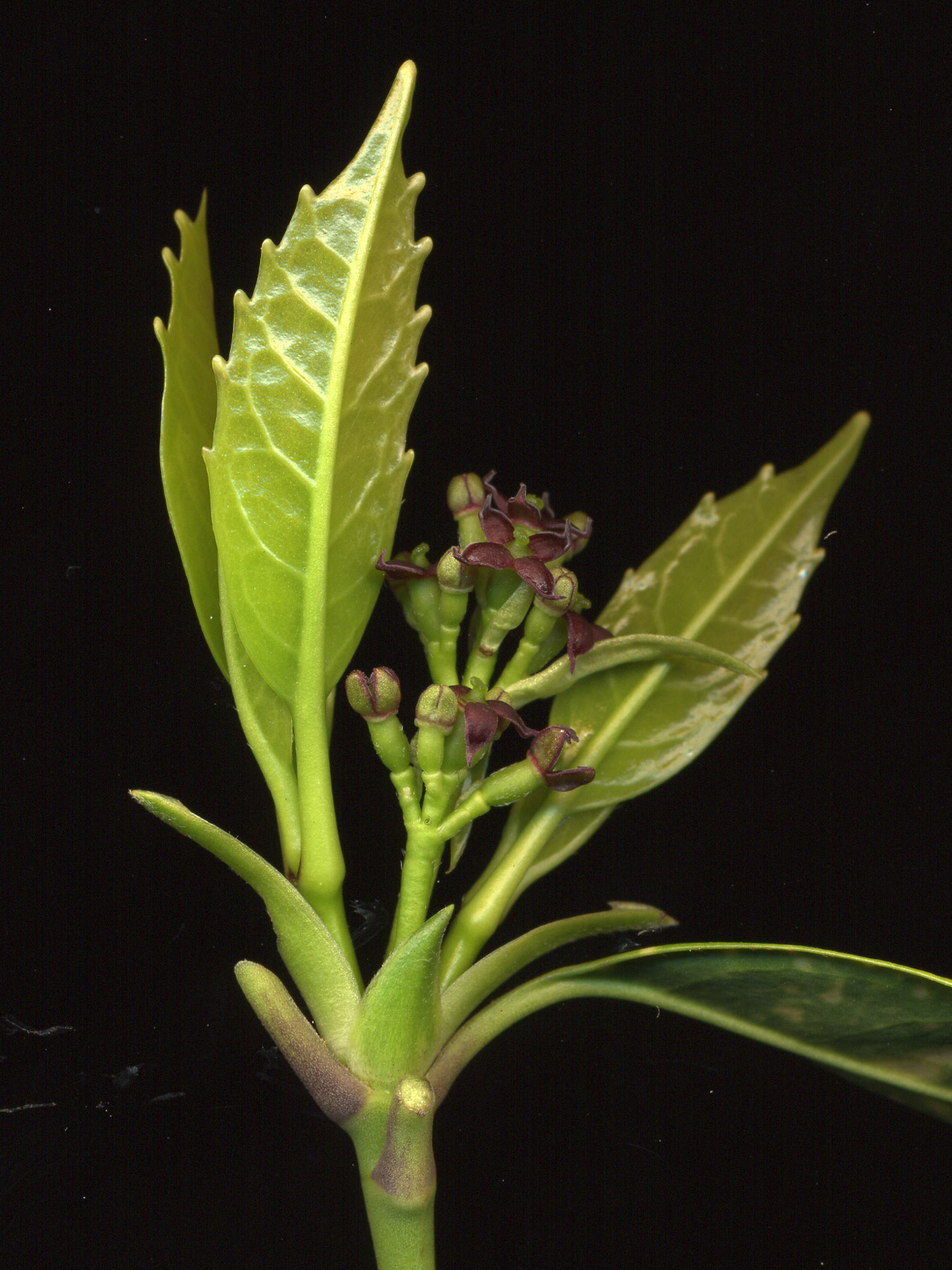 Bourgeon d'Aucuba montrant les jeunes feuilles